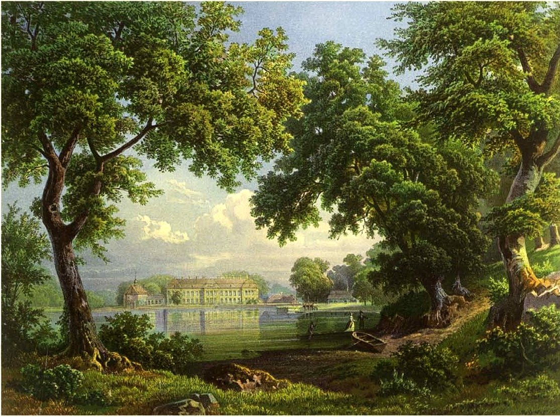 Schloss Friedrichstein, Landkreis Königsberg